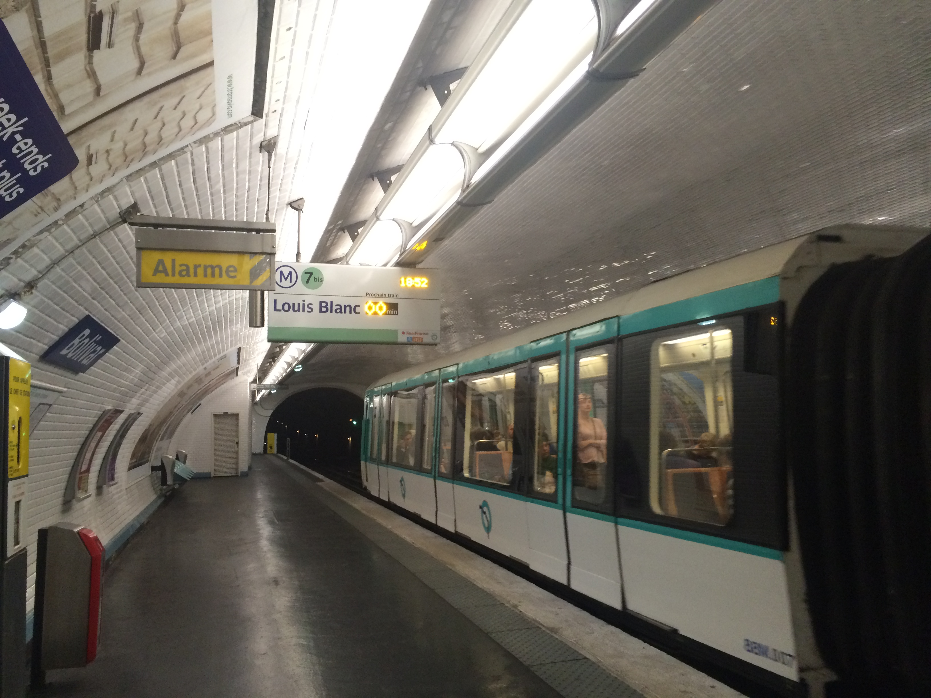 Station de métro Bolivar en mai 2016 : rames à quai en station, direction Louis Blanc